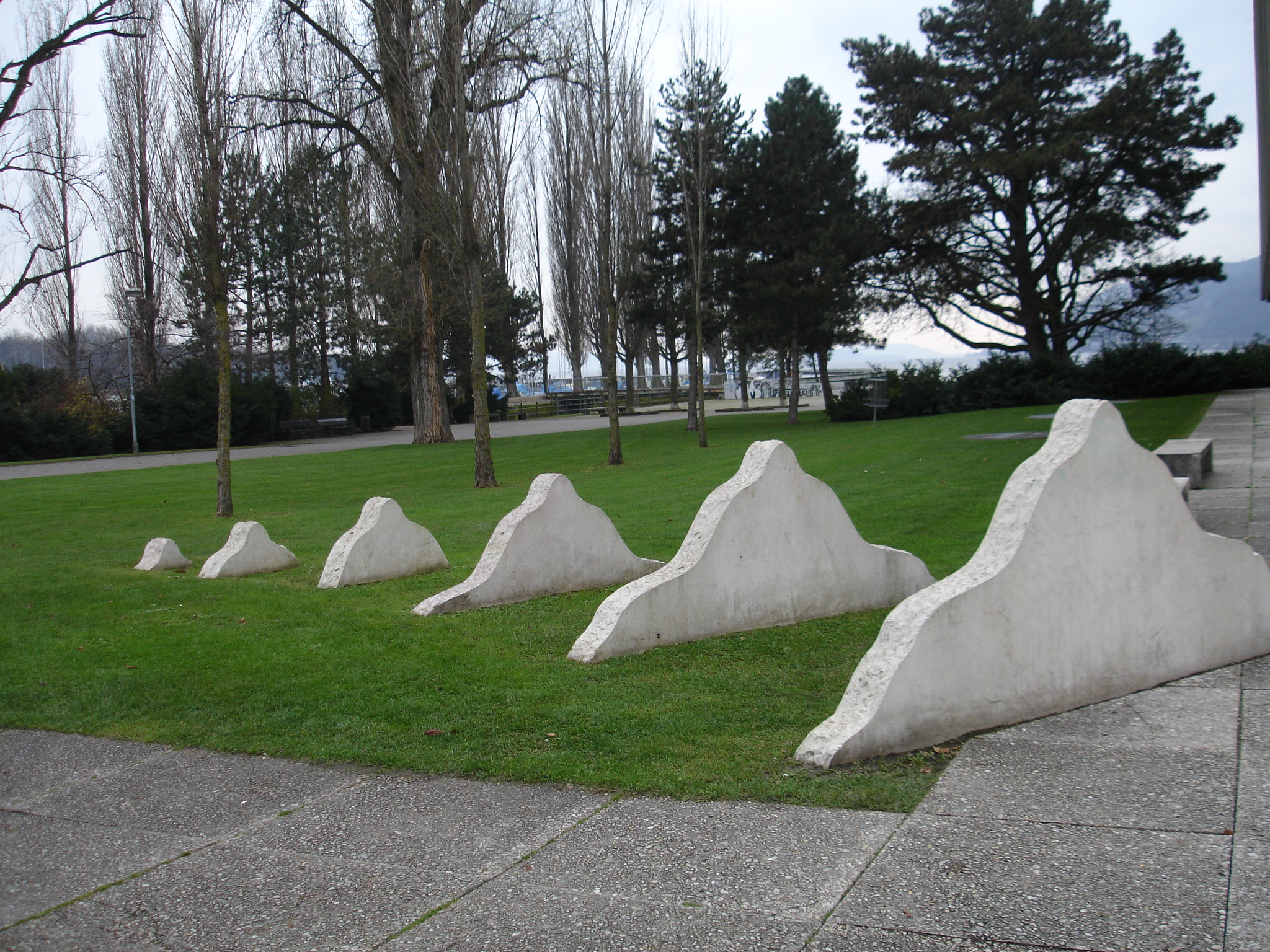 Gymnasium am Strandboden with sculpture Jura by Ueli Berger in Biel/Bienne (Switzerland) Kunst und Bau Künstler: Werk